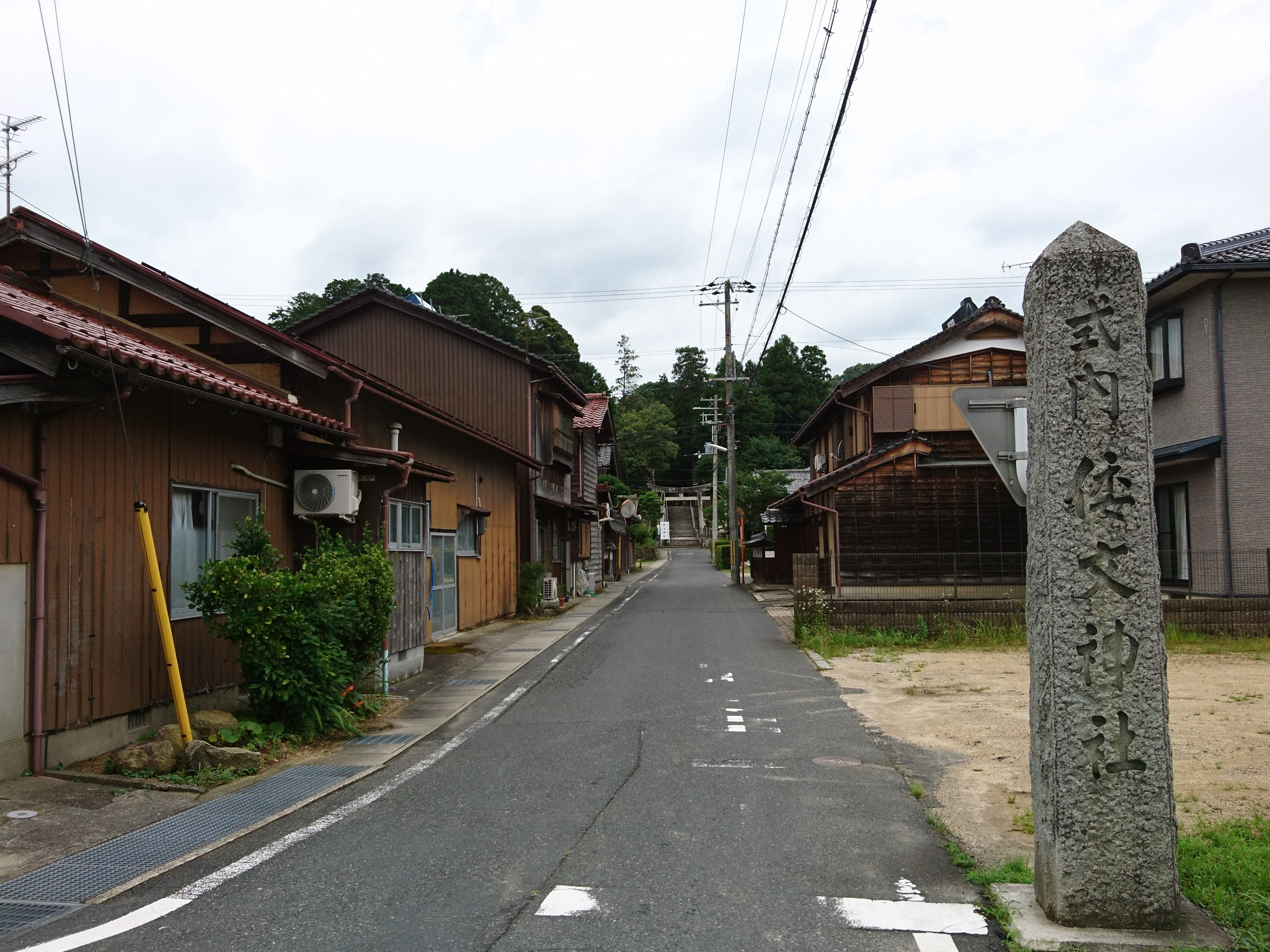 倭文神社(与謝)の府道から